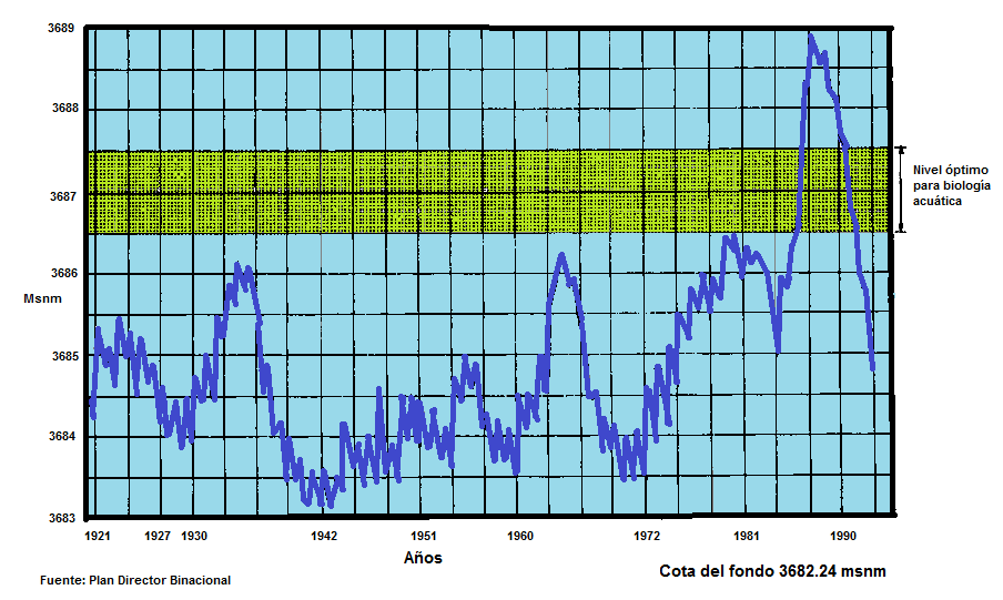 Simulación matematica de los niveles del lago Poopó. Fuente: Plan Director Binacional